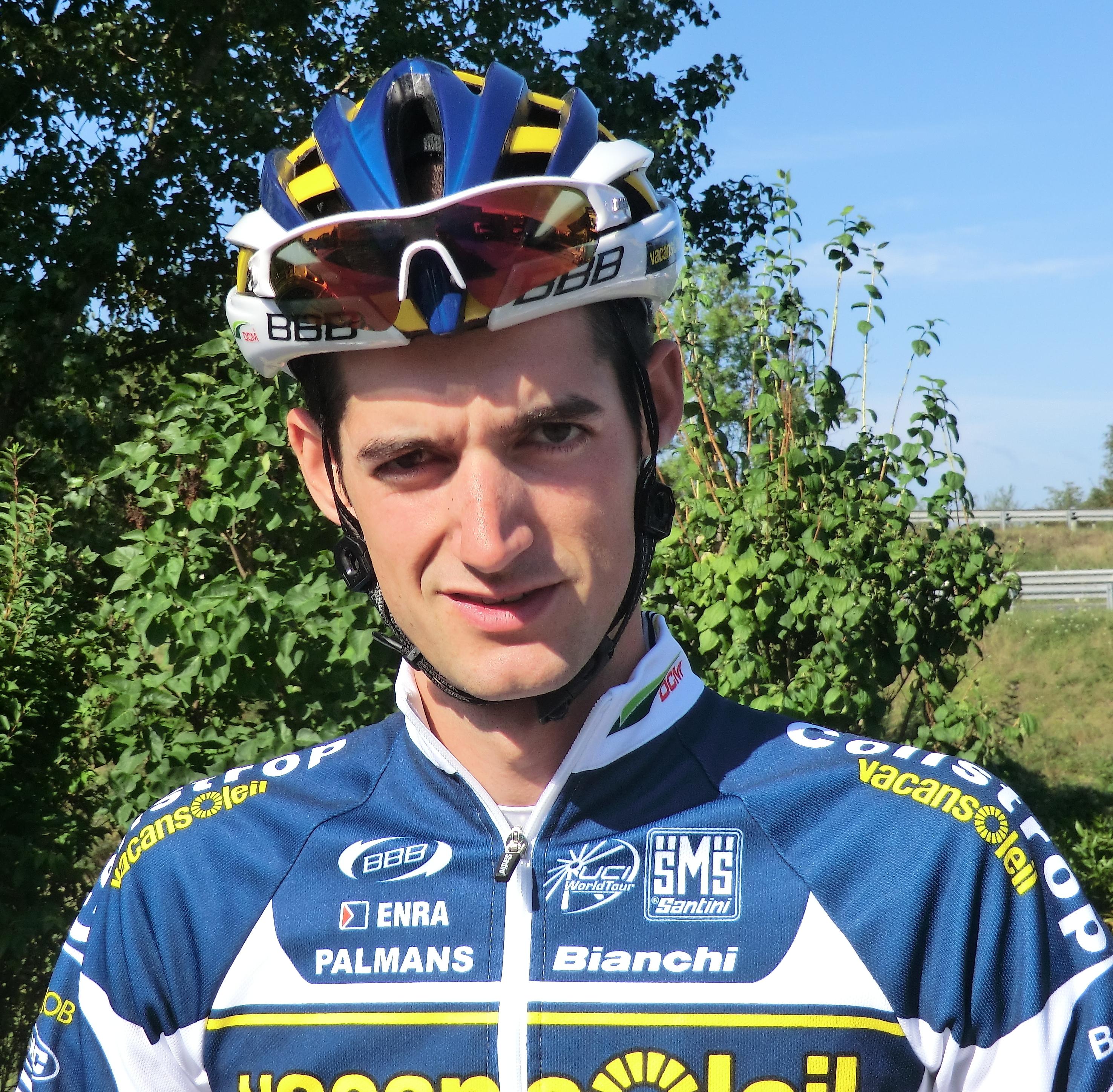 Coureurs à l'échauffement au matin du prologue du tour de l'Ain 2013, à l'hôtel Lyon-Est à Saint-Maurice-de-Beynost.